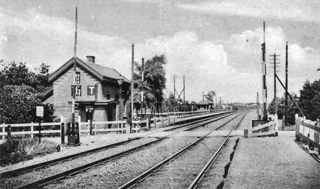 Station IJzeren Man te Vught== Licentie ==